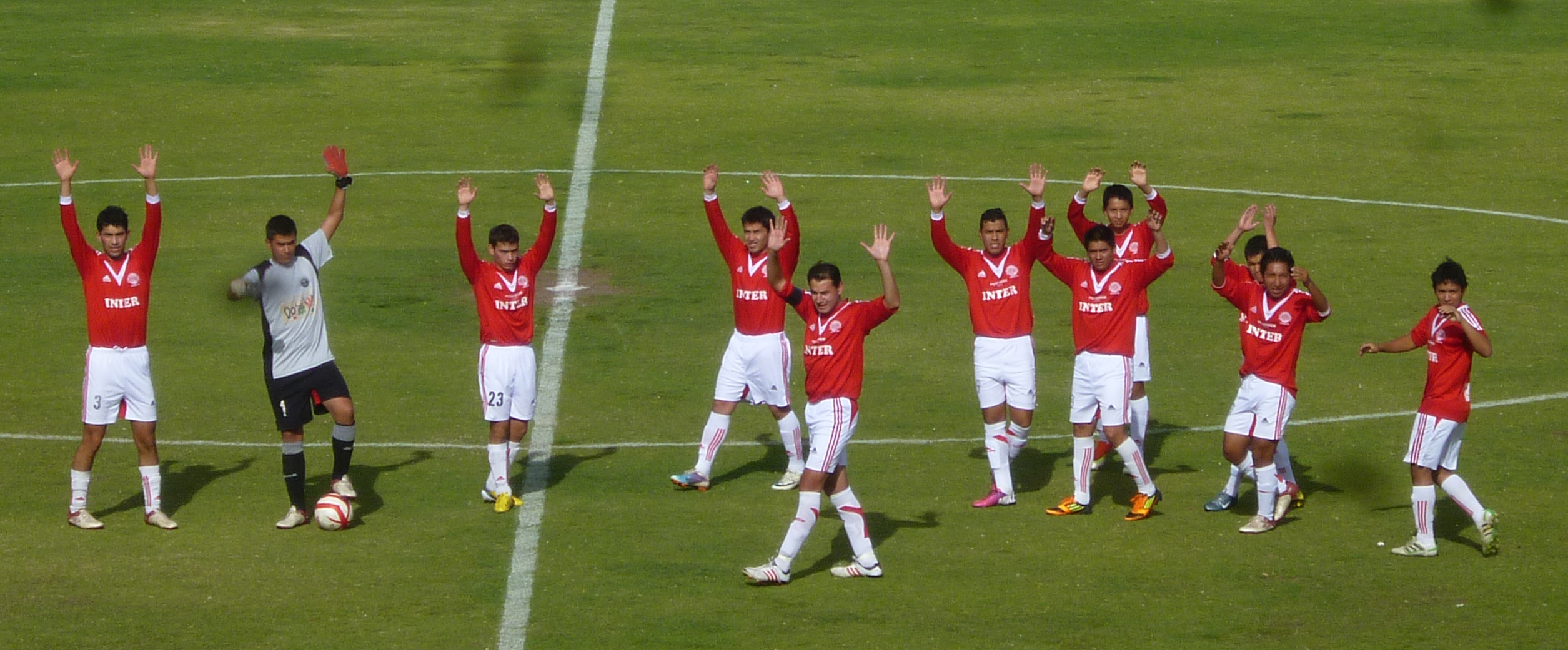 Equipo de futbol del Club Internacional 2013